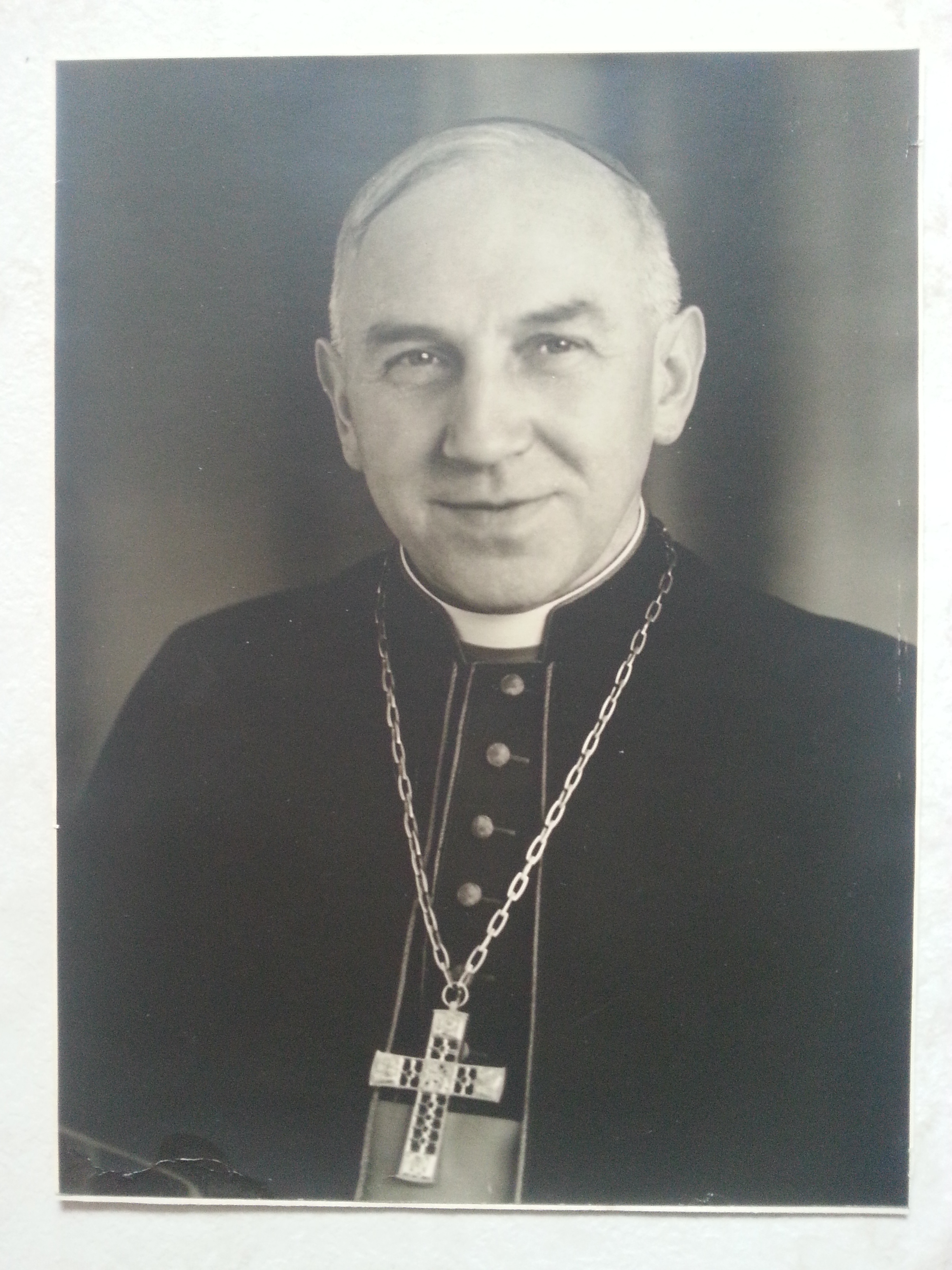 Porträt Dr. Ferdinand Dirichs, Bischof von Limburg